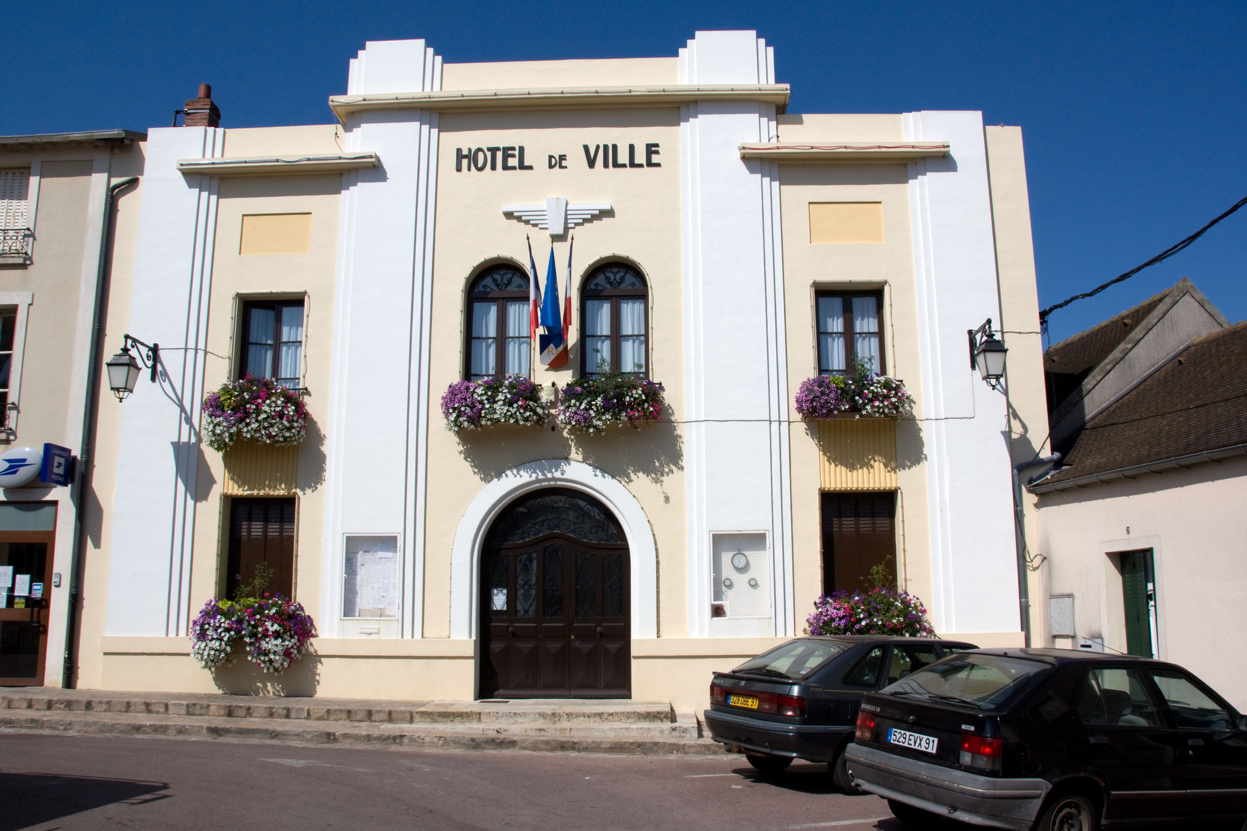 La mairie de Maisse, Maisse, Essonne, France